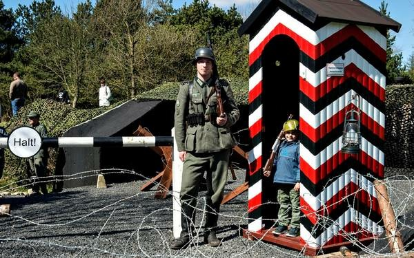 Tarp Bunkermuseum : Vagtsoldat med lille dreng